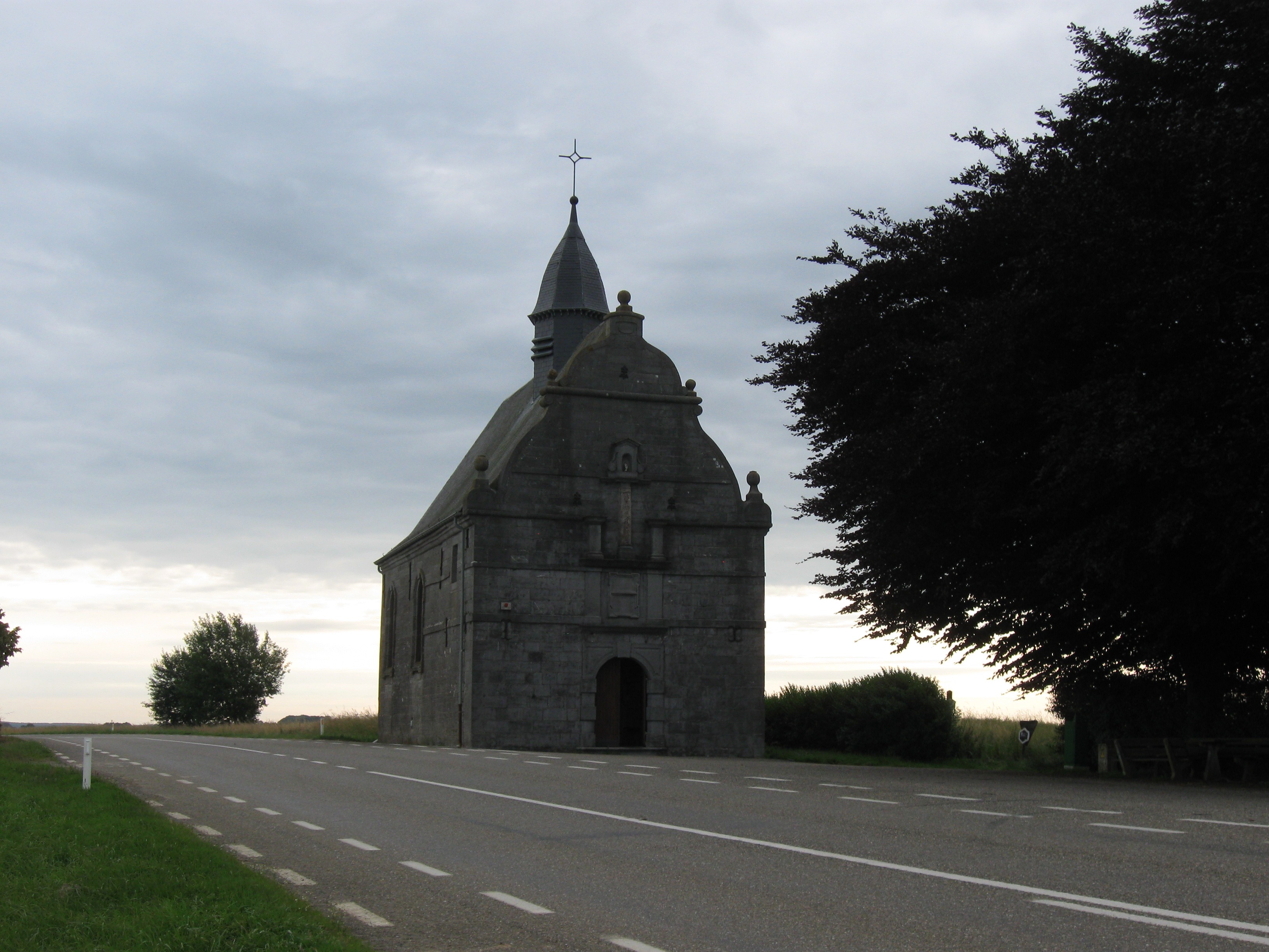 N-D del Pilar